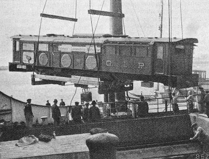 Verladen der G. I. P.-Lokomotive der SLM Winterthur vom Bahngeleise auf das Schiff in Antwerpen